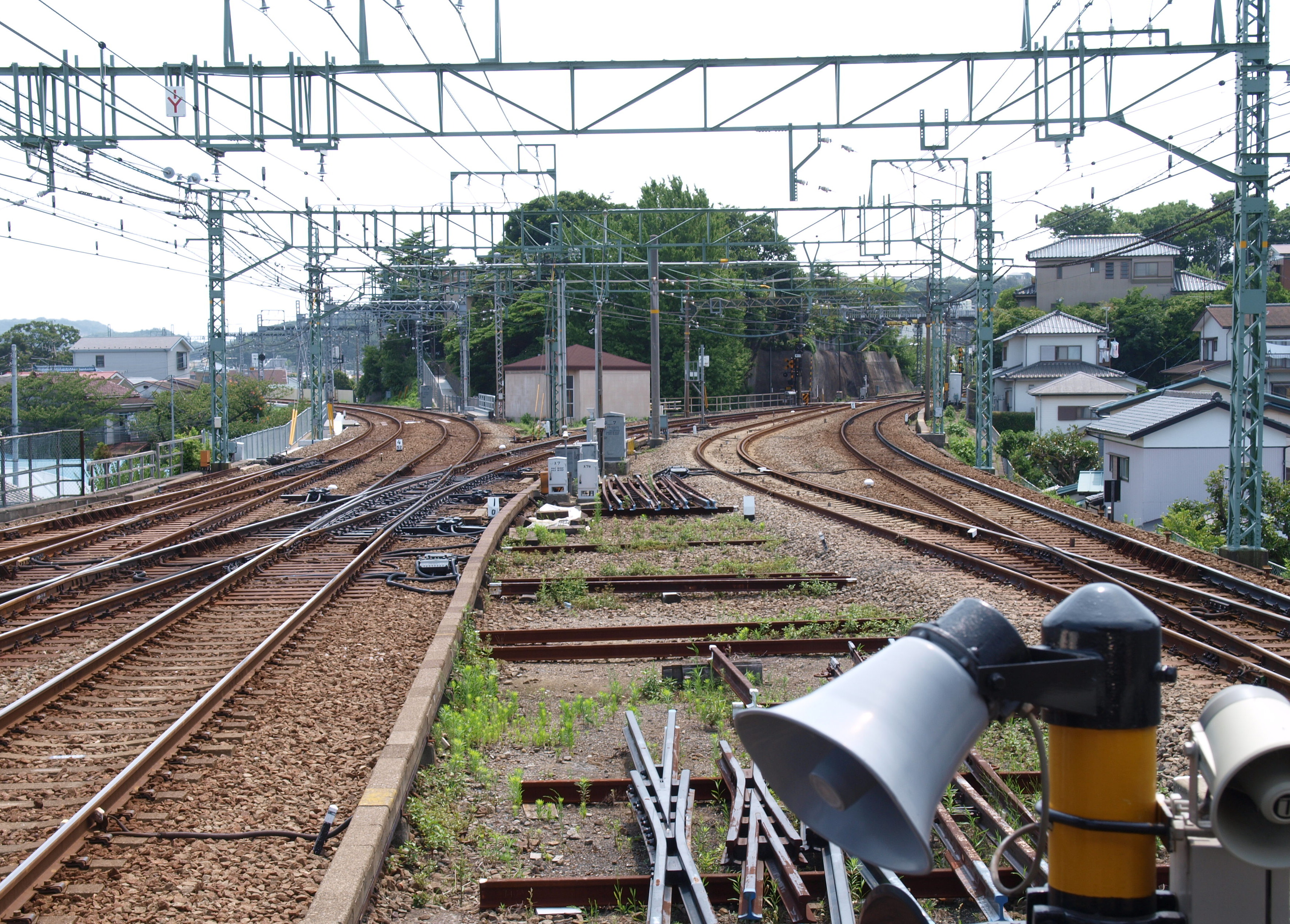 堀ノ内駅 浦賀方の配線